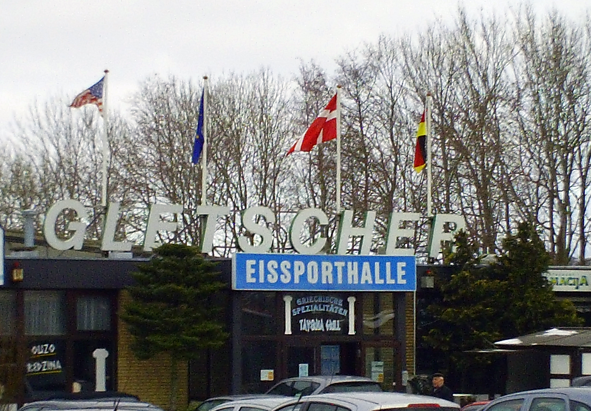 Die Eispoorthalle Gletscher in Kupfermühle bei Flensburg